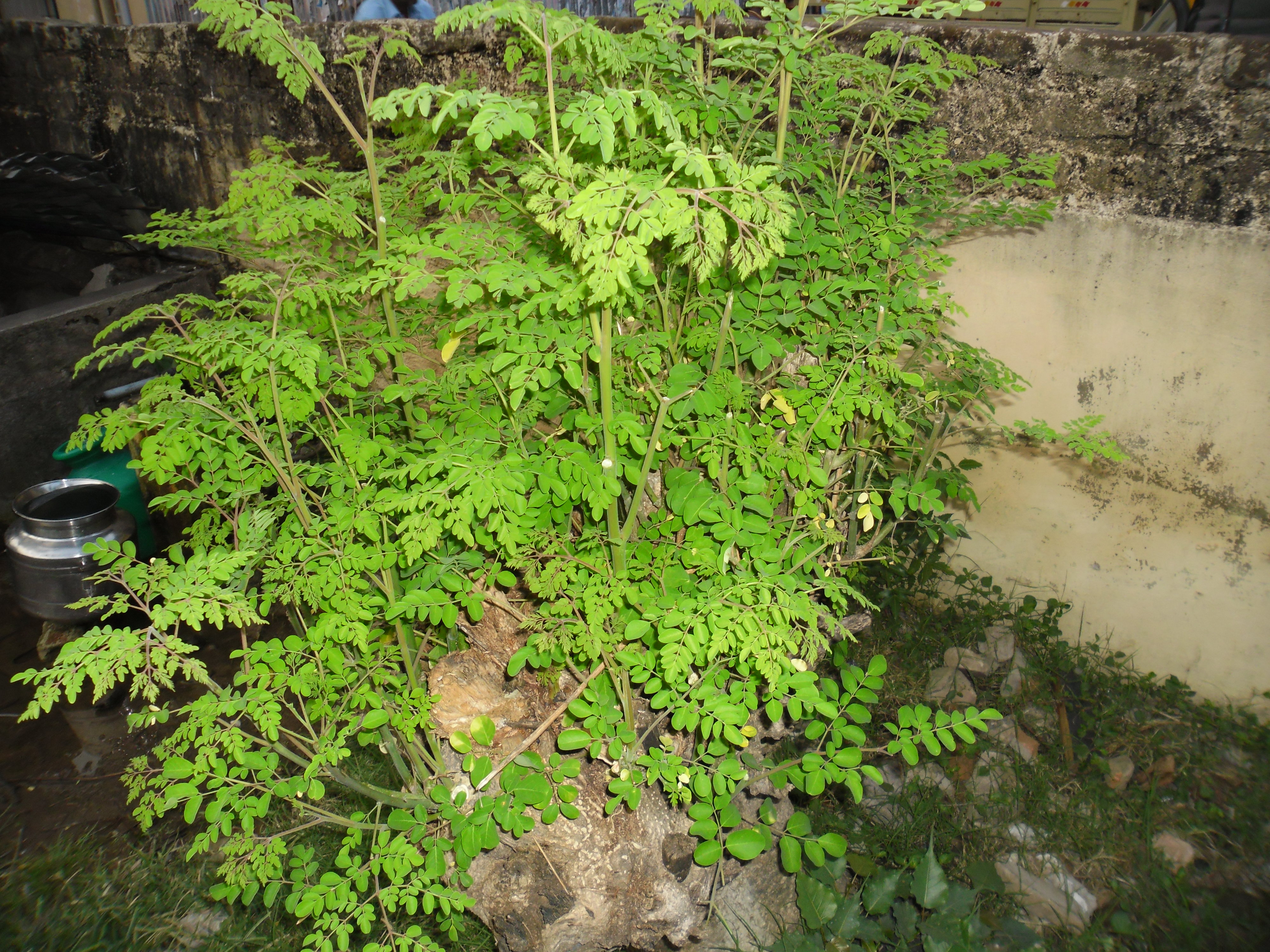 Drumstick leaves found in Tamil Nadu